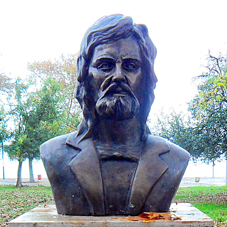 Бюст на Христофор Жефарович